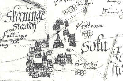 Skänninge, en av de äldsta kartbilderna.